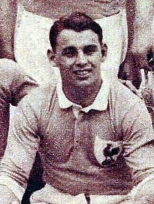 Joseph Desclaux en 1937 (avec l'équipe de France face à l'Allemagne).